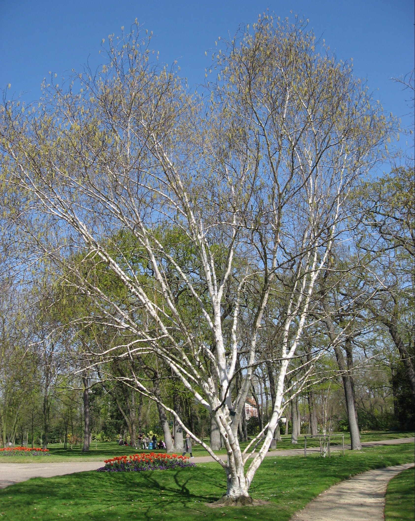 Betula utilis var. jacquemontii in Jardin du Pré-Catelan Map: 48° 51' 55" N 2° 15' 16" E